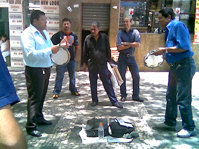 o dom da rima é foda! repente e gargalhadas rolando soltas no centro da cidade, numa tarde de sábado.